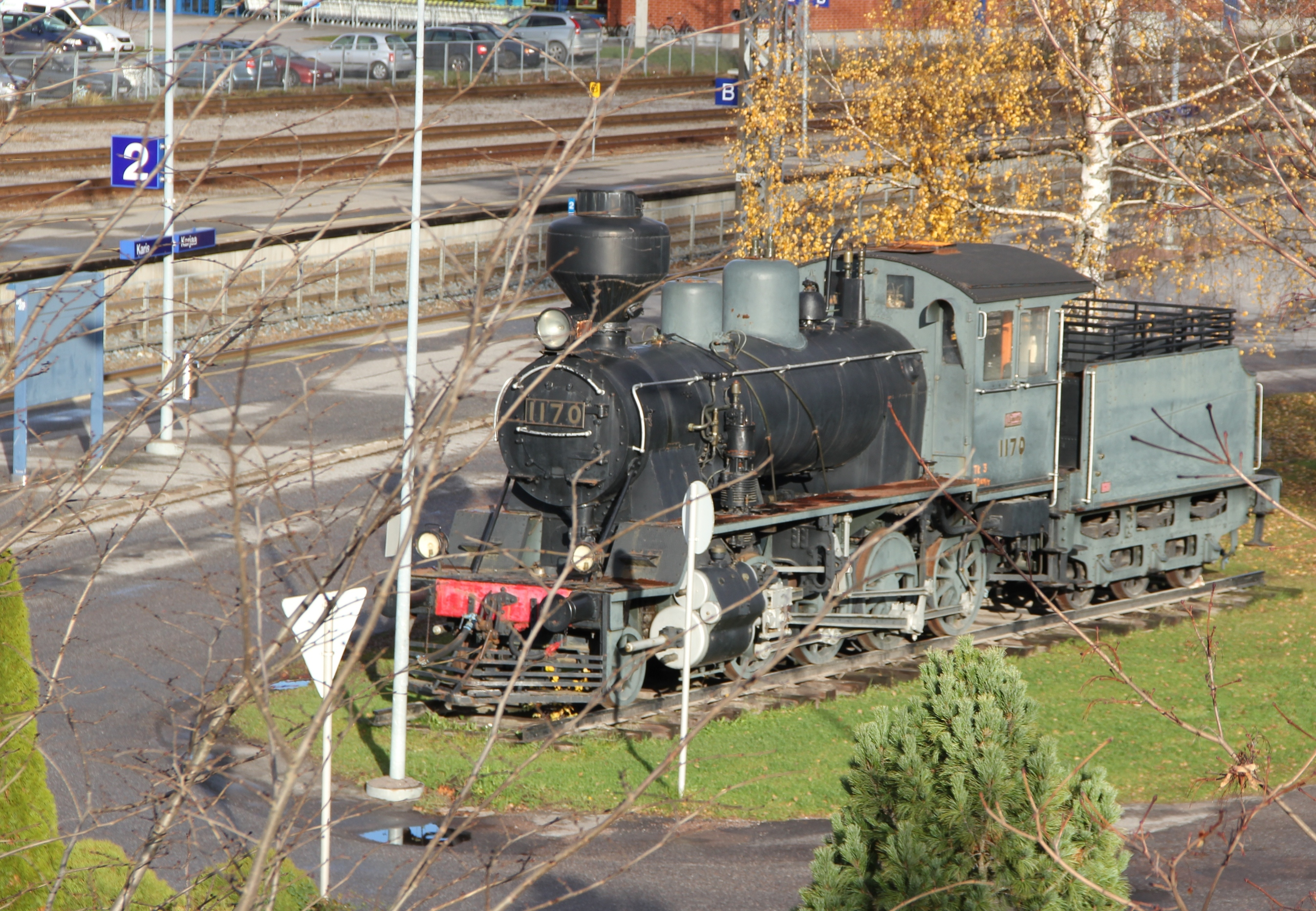 Tk3 on keskiraskas tavarajunaveturi. Sen lempinimi on Pikku-Jumbo. Tämän on valmistanut Lokomo vuonna 1953.